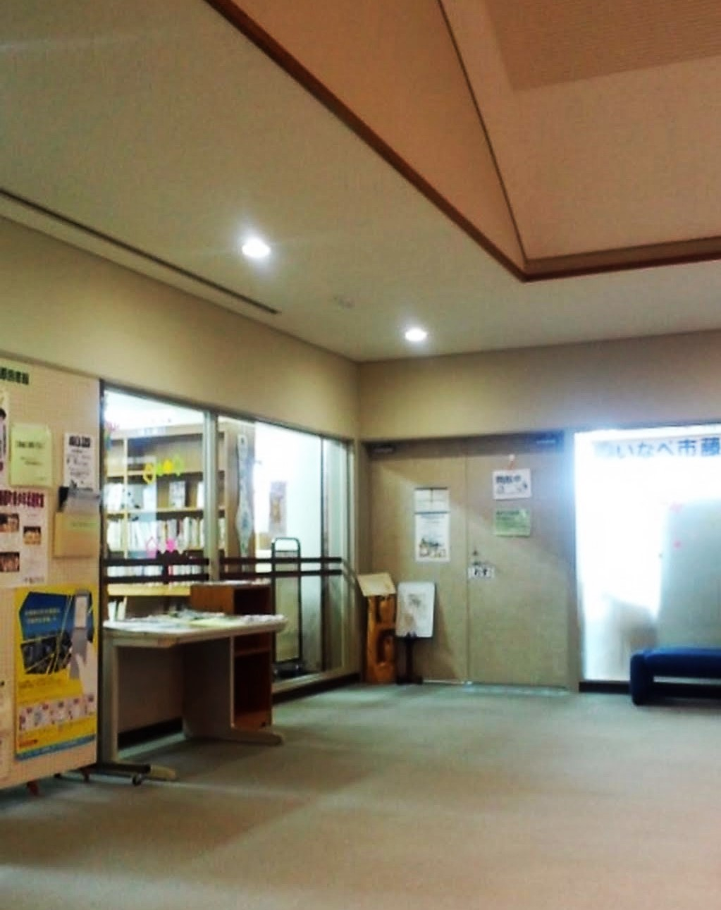 いなべ市藤原図書館。